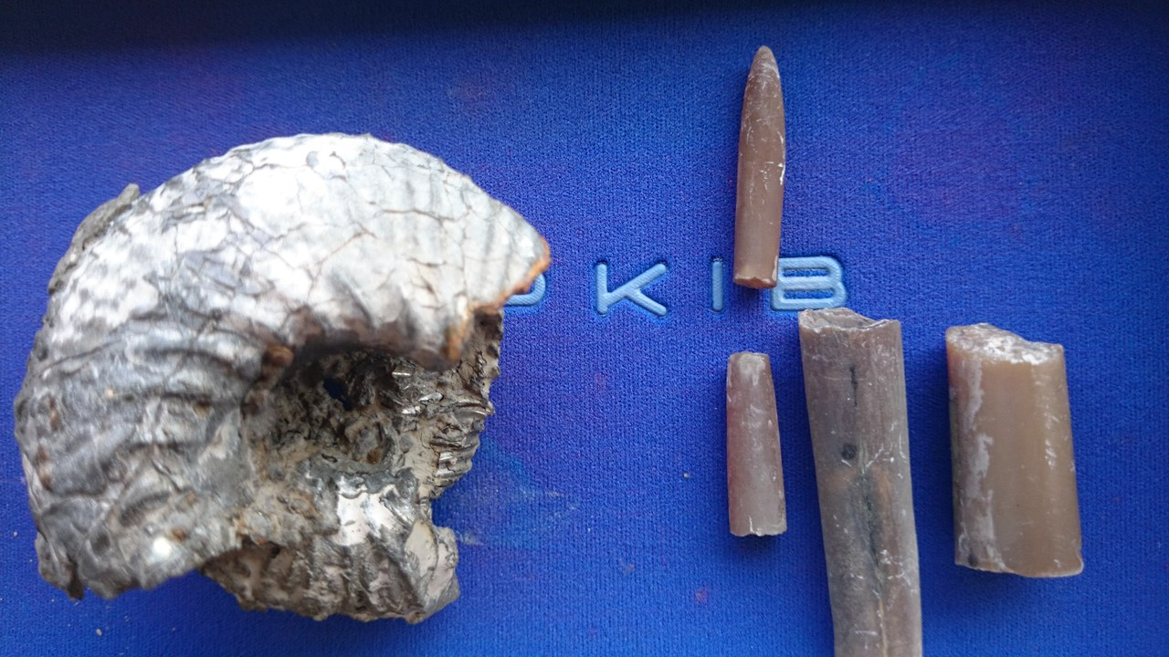 Алшиховские артефакты